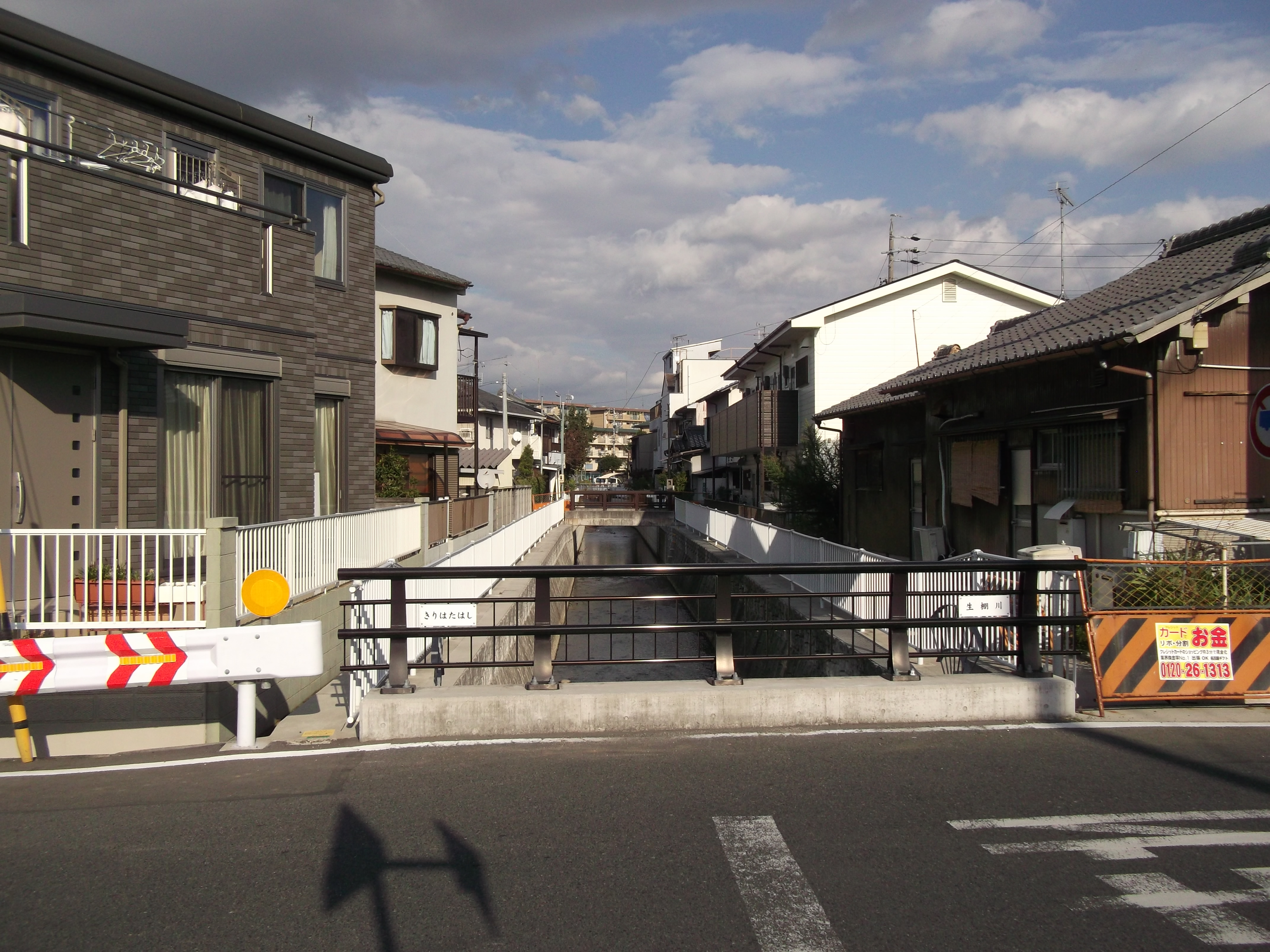 名古屋市北区桐畑町・如意の町境となっている生棚川（右が桐畑町・左が如意）